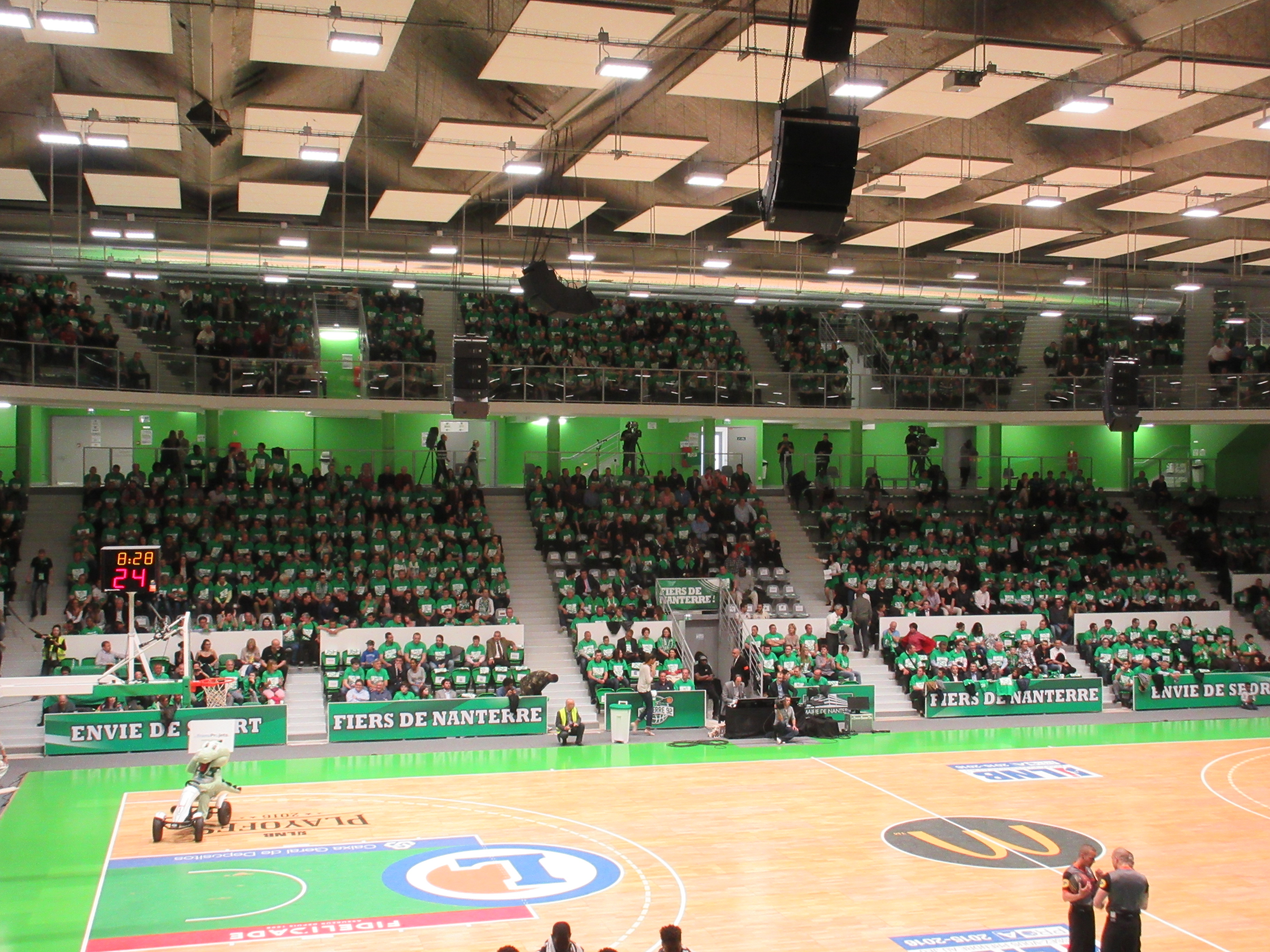 Photo de la nouvelle tribune du palais des sports Maurice Thorez à Nanterre. L'ajout de cette tribune a permis de doubler la capacité d'accueil passant ainsi de 1500 à 3000 spectateurs. La photo a été prise lors des quarts de finale des playoffs de la saison 2015-2016 de Pro A, Nanterre 92 recevait Monaco et a perdu sur le score de 93-76.